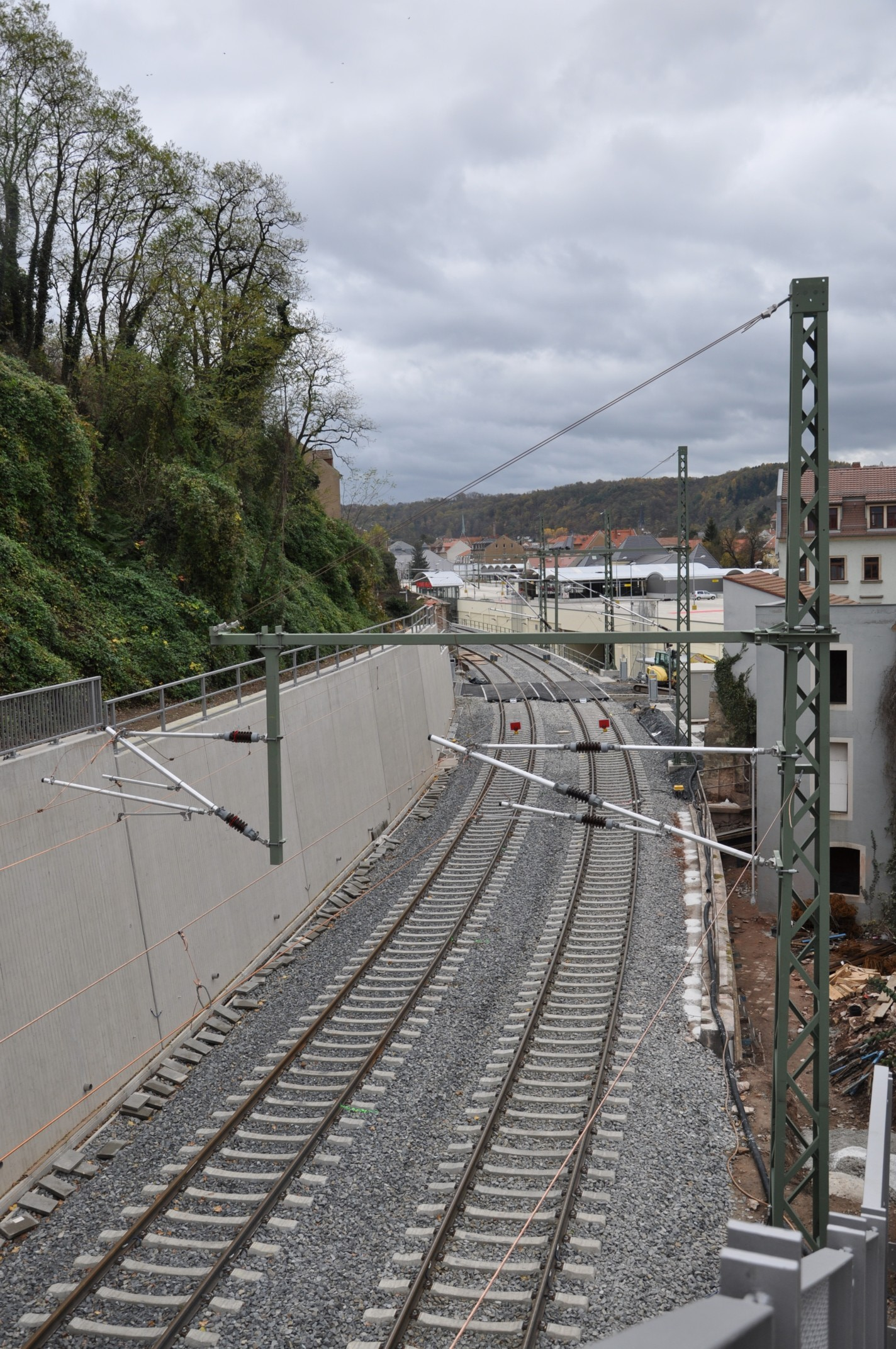 Bahnstrecke Borsdorf–Coswig zwischen Meißen Altstadt und Meißen